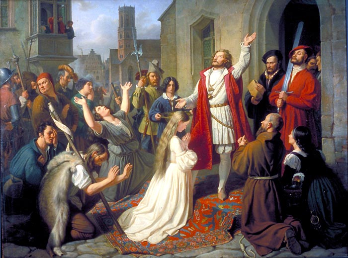 Jan van Leiden bei der Taufe eines Mädchens während der Herrschaft der Täufer in Münster